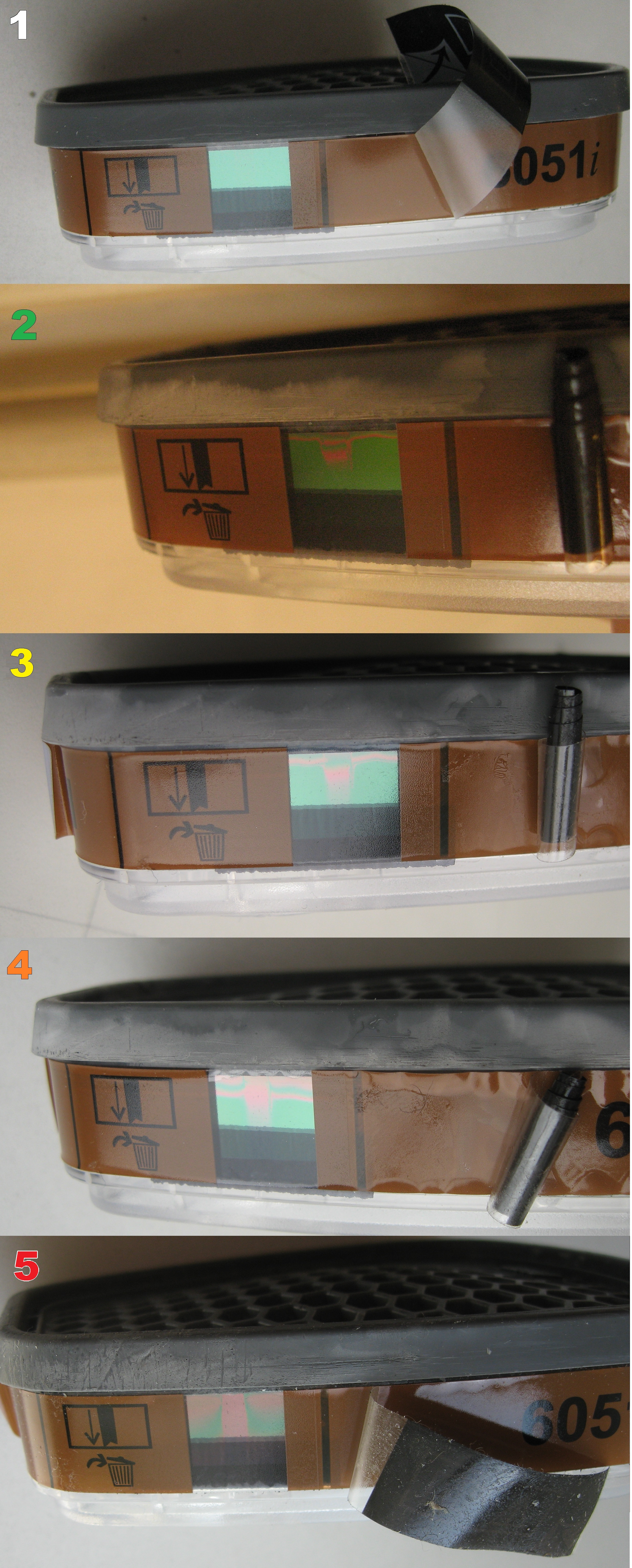 Изменение в индикаторе окончания срока службы противогазного фильтра (ESLI) по мере воздействия паров органических соединений